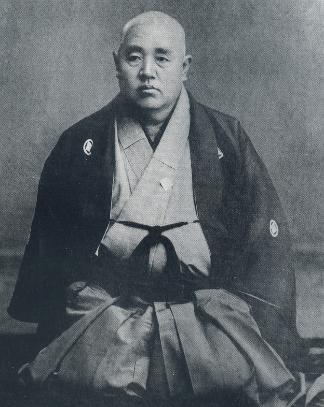 日本の実業家、帯谷宗七の肖像写真